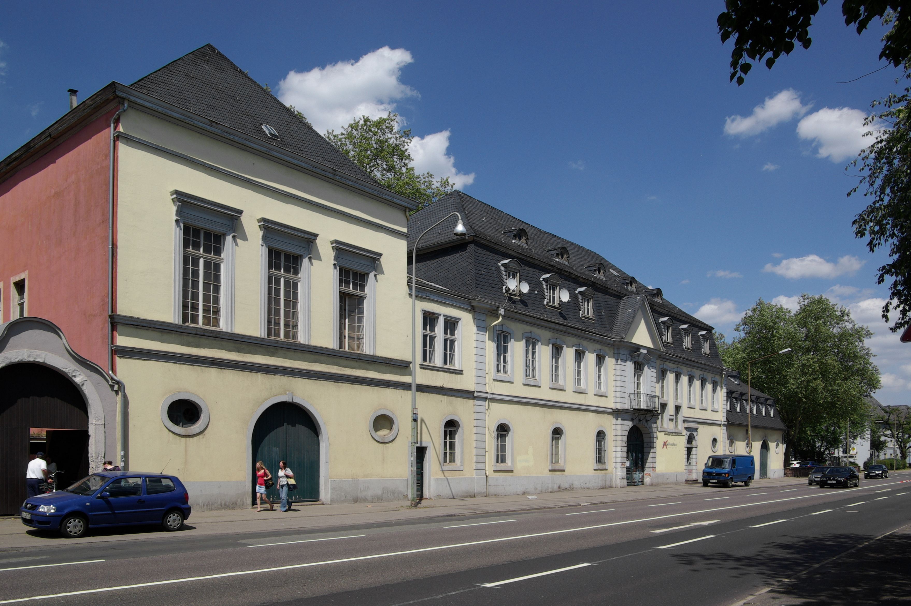 Zurmaiener Straße 114: sogenanntes Exzellenzhaus; ehemaliges Wirtschaftsgebäude der Benediktinerabtei St. Maria ad Martyres; Dreiflügelanlage, zweite Hälfte des 18. Jahrhunderts, Aufstockung des Südflügels 1875; Gartenmauer mit drei Pavillons, Gartenabschlussmauer mit Eingangstor